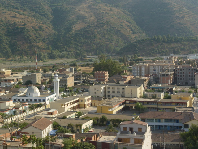 Centre ville de Kediria (wilaya de Bouira, Algérie).